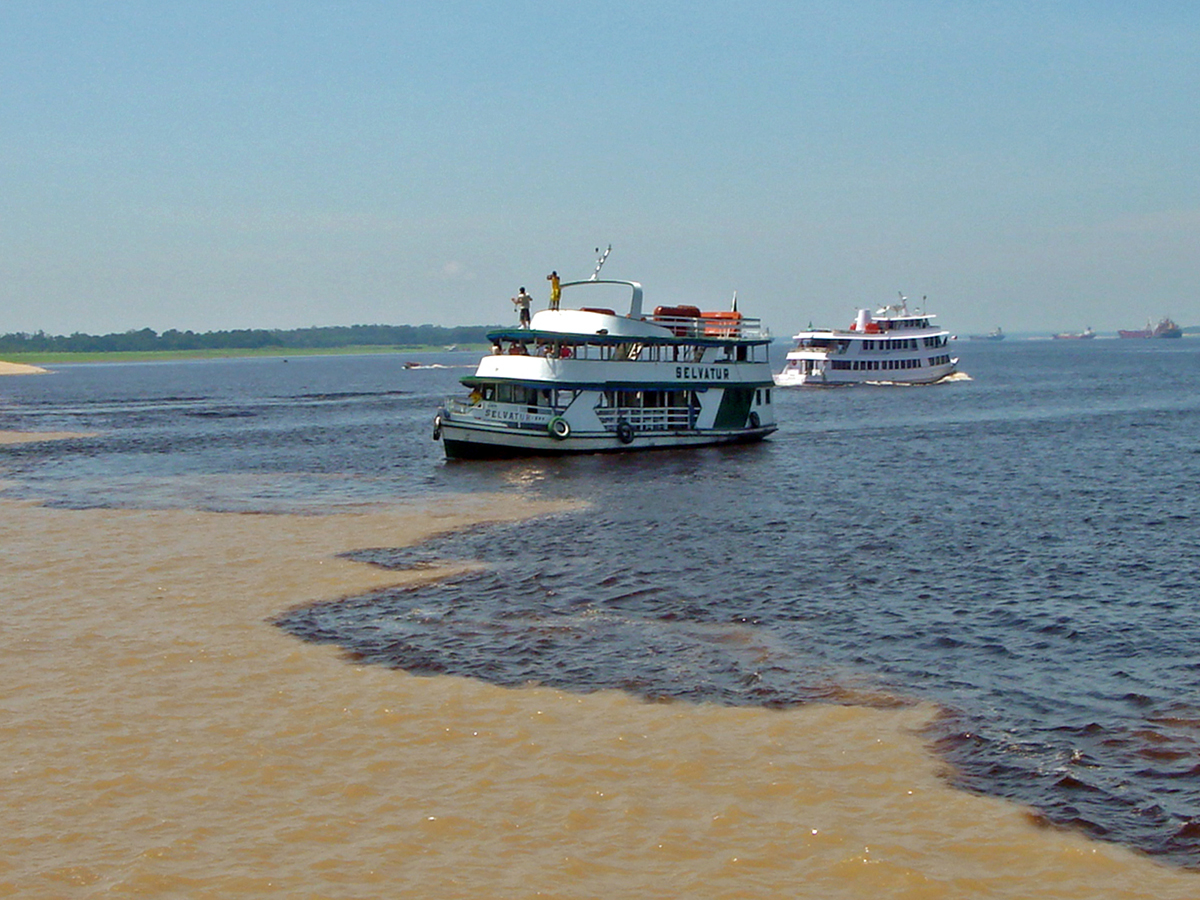 Rio Amazonas: Encontro das águas rio Solimões e rio Negro